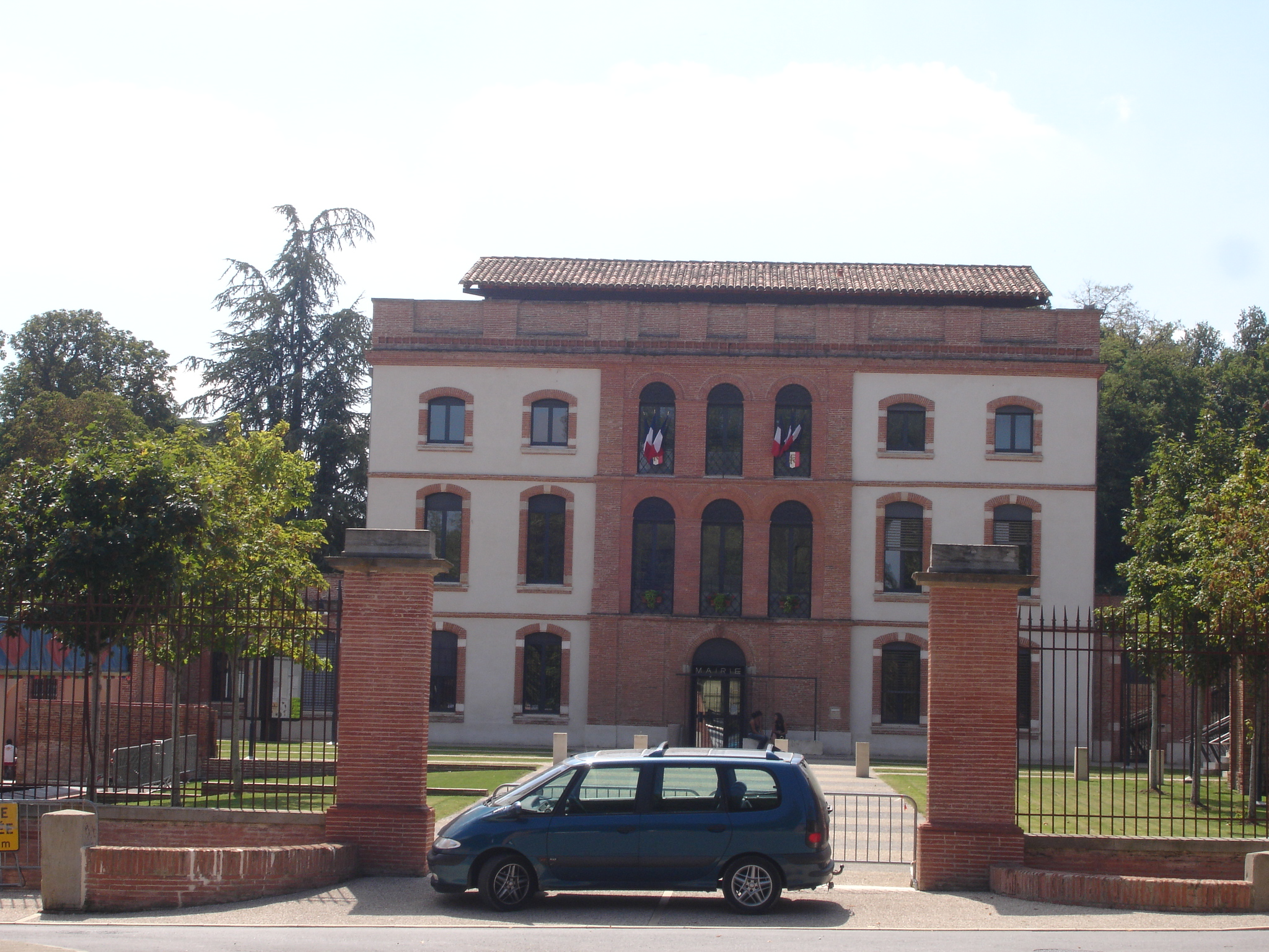 France, Haute-Garonne (31), Ayguesvives, mairie